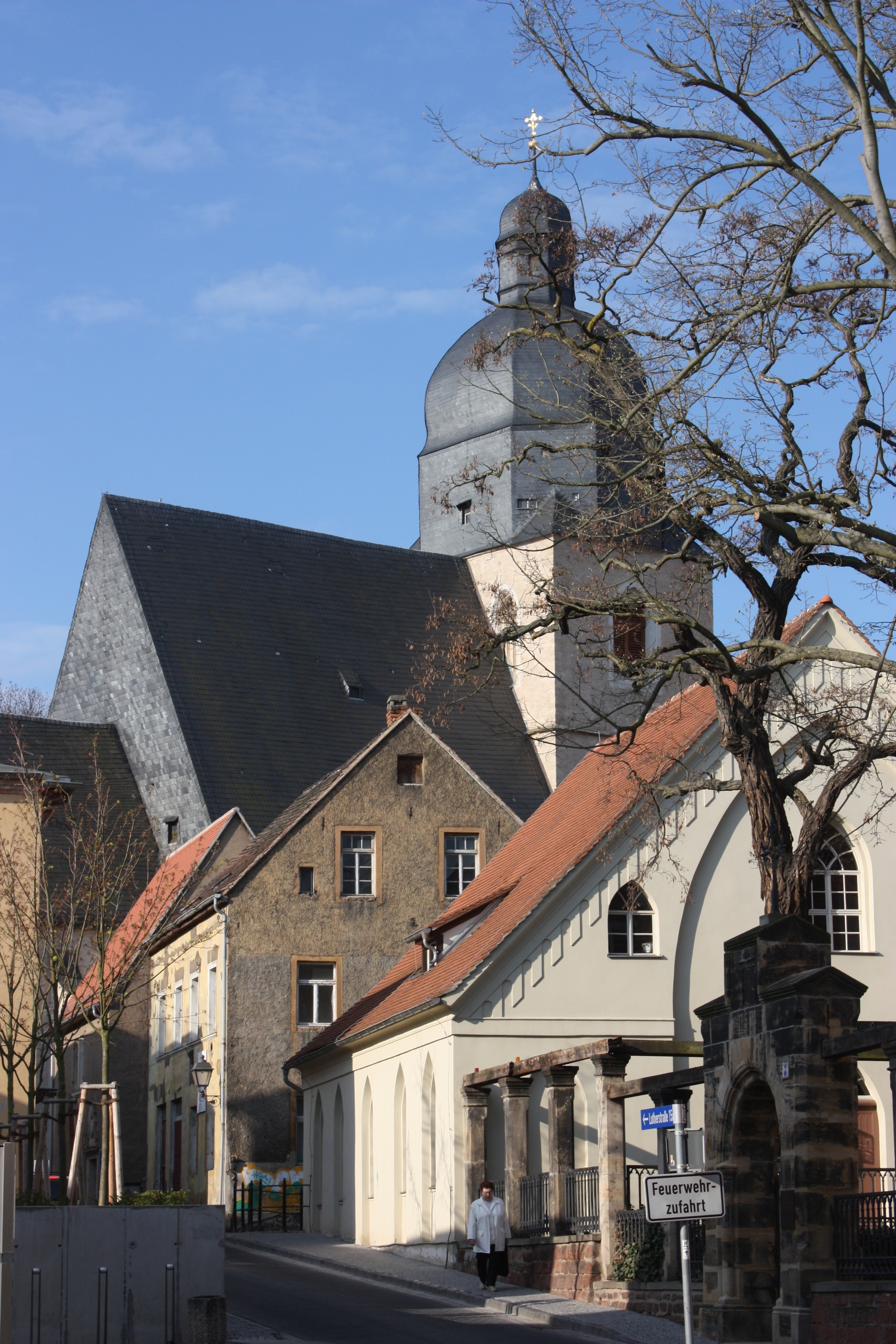 Eisleben, Petrikirche - Luthers Taufkirche; im Vordergrund Nebengebäude von Luthers Geburtshaus